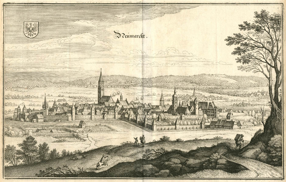 Historischer Kupferstich der Stadt Neumarkt in der Oberpfalz aus Matthaeus Merians "Topographia Bavariae".